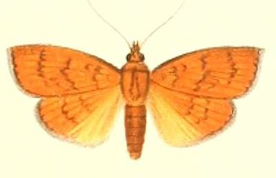 Paliga ignealis (Walker 1866)